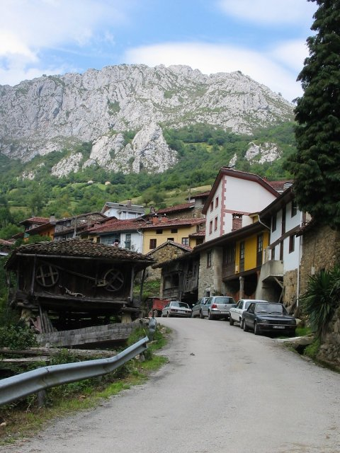 Caleao.